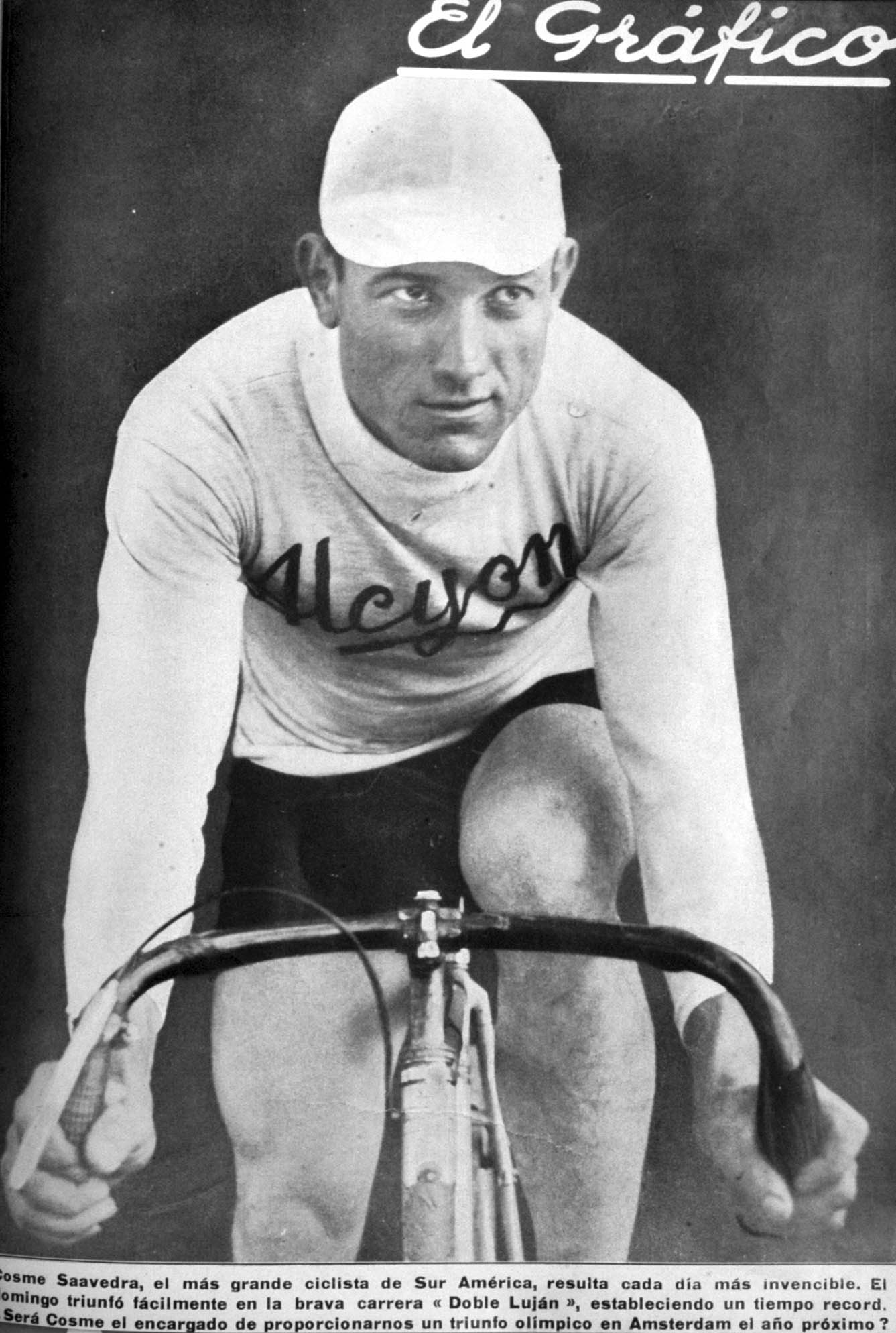 El Grafico del 24 de Diciembre de 1927. Edicion 442